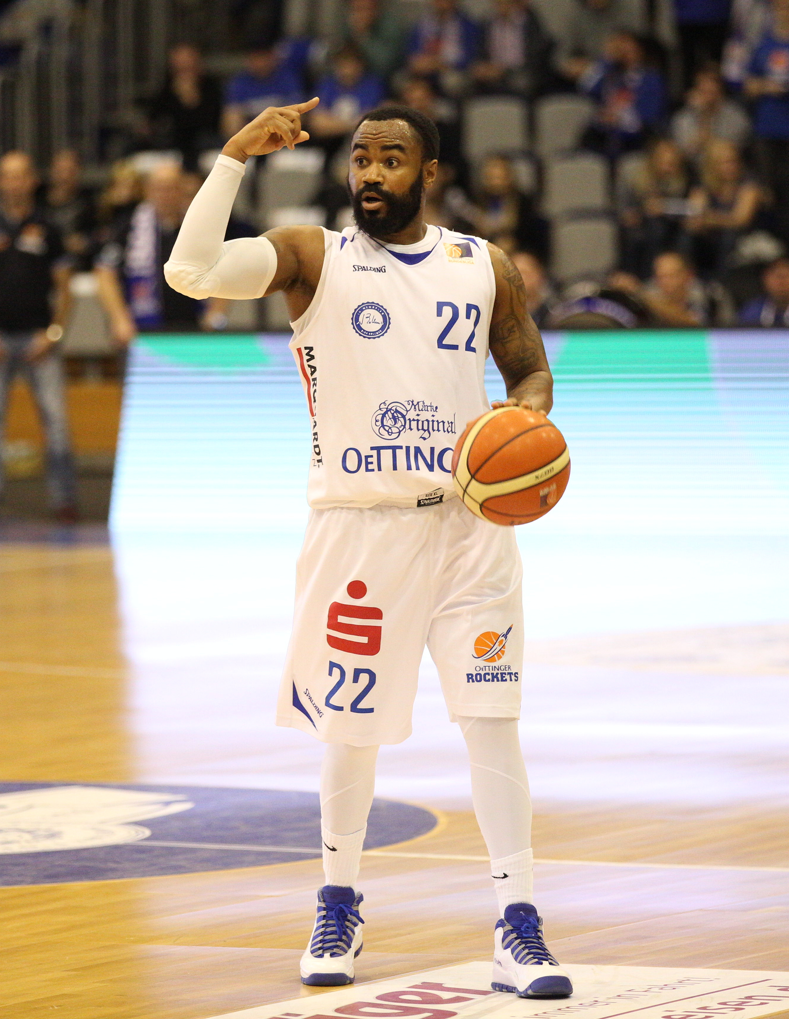 2. Basketball-Bundesliga (21. Spieltag; 2. Februar 2017; Game-ID: 102913): Darrel Mitchell (22, Oettinger Rockets)